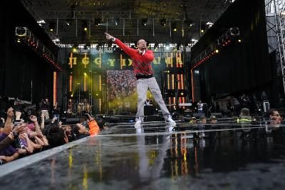 Jiggy Drama en tarima Evento 40 Bogota 2010